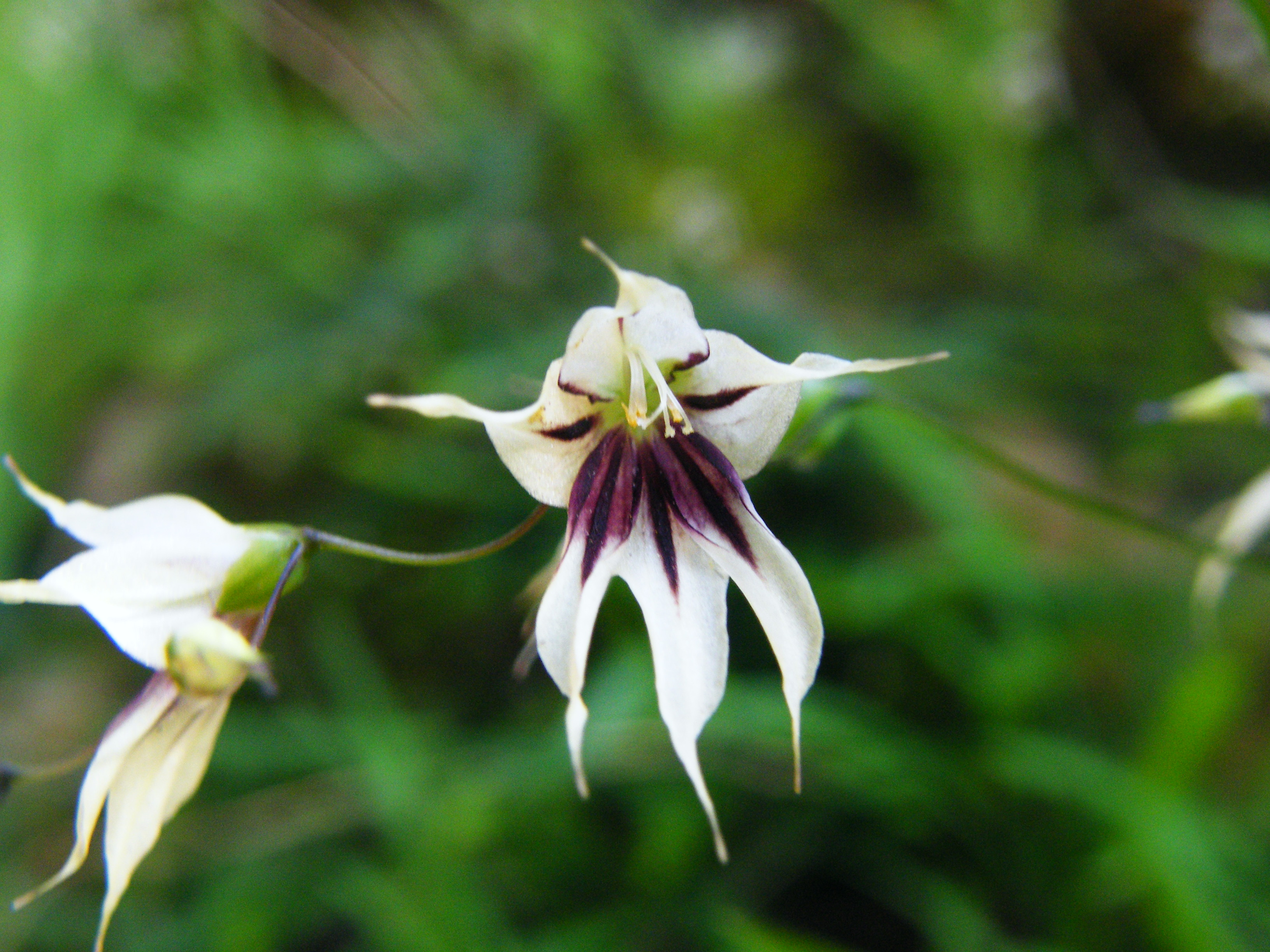 Baardmannetjie